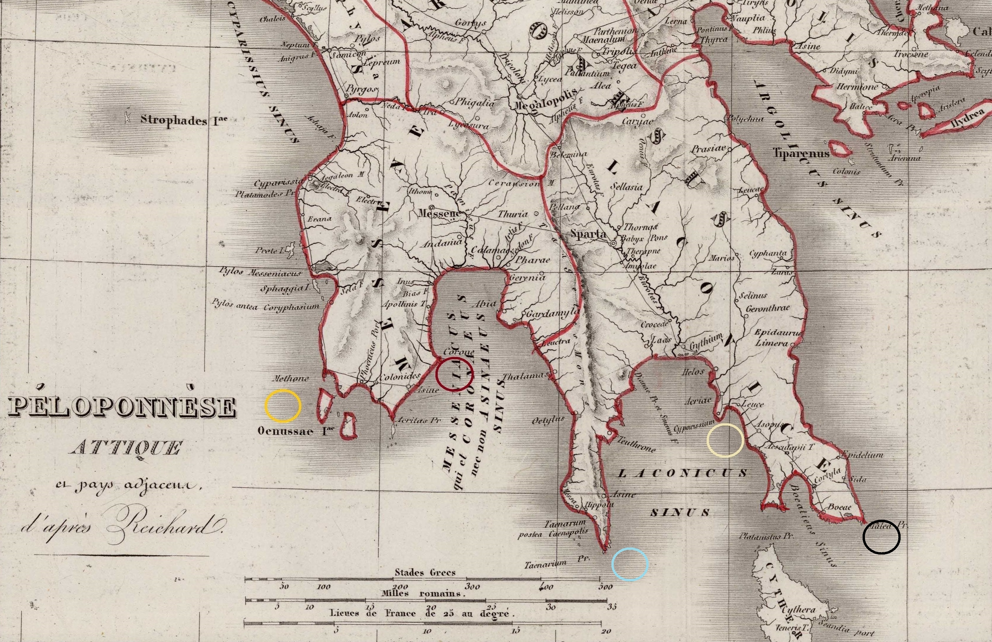 Batalha de Matapão, 19 de Julho de 1717 ― Mapa ― Ouro: local aproximado do encontro da armada cristã vinda de Corfu com a Armata grossa veneziana a 2 de Julho, ao largo de Modon. ― Azul: Cabo Matapão, que a armada cristã patrulhou de 3 a 14 de Julho. ― Negro: Cabo de Santo Ângelo, que a armada otomana dobrou a 5 de Julho. ― Vermelho: o porto de Coron, que serviu de base à armada otomana depois de esta ter dobrado o Matapão a 10 de Julho. ― Branco: onde se travou a Batalha de Matapão, no Golfo da Lacónia.